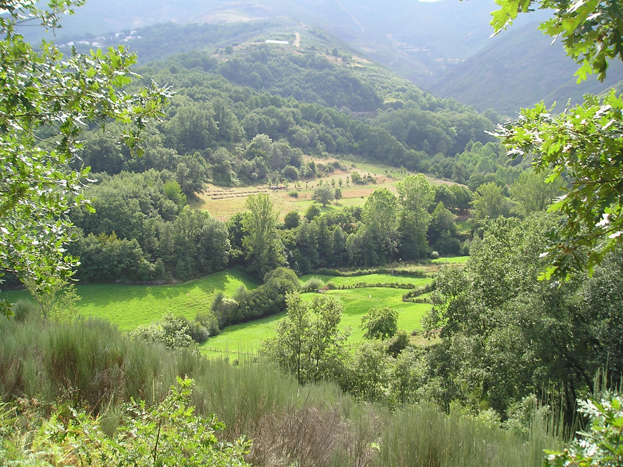 prado